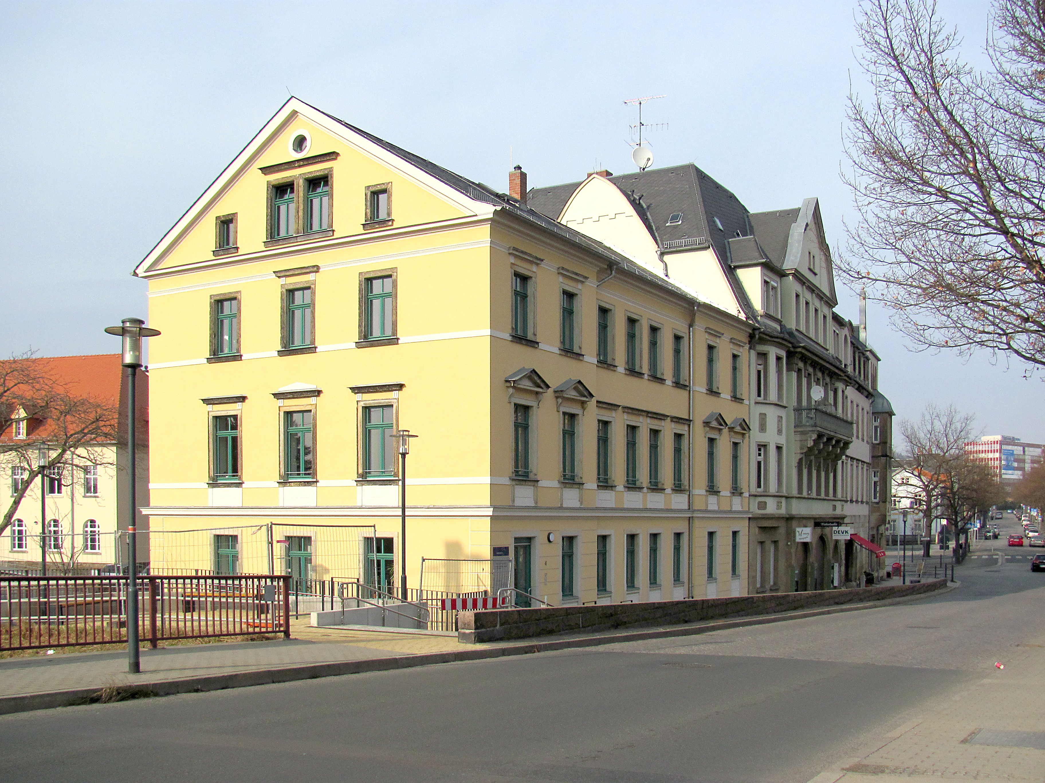 Radebeul, Wohn- und Geschäftshaus Hauptstraße 4. Rechts schließen sich die Wohn- und Geschäftshäuser Hauptstraße 6 und 8 an, links ist die Rückseite des ehemaligen Radebeuler Postamts zu sehen